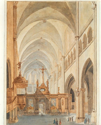 Intérieur de la collégiale Saint-Thomas de Crépy-en-Valois, gravure issue de la collection d'Hippolyte Destailleur (1822-1893).